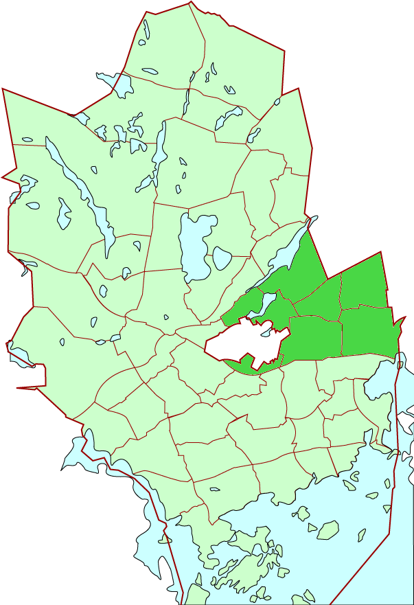 Suur-Leppävaara/Stor-Alberga district in Espoo city, Finland